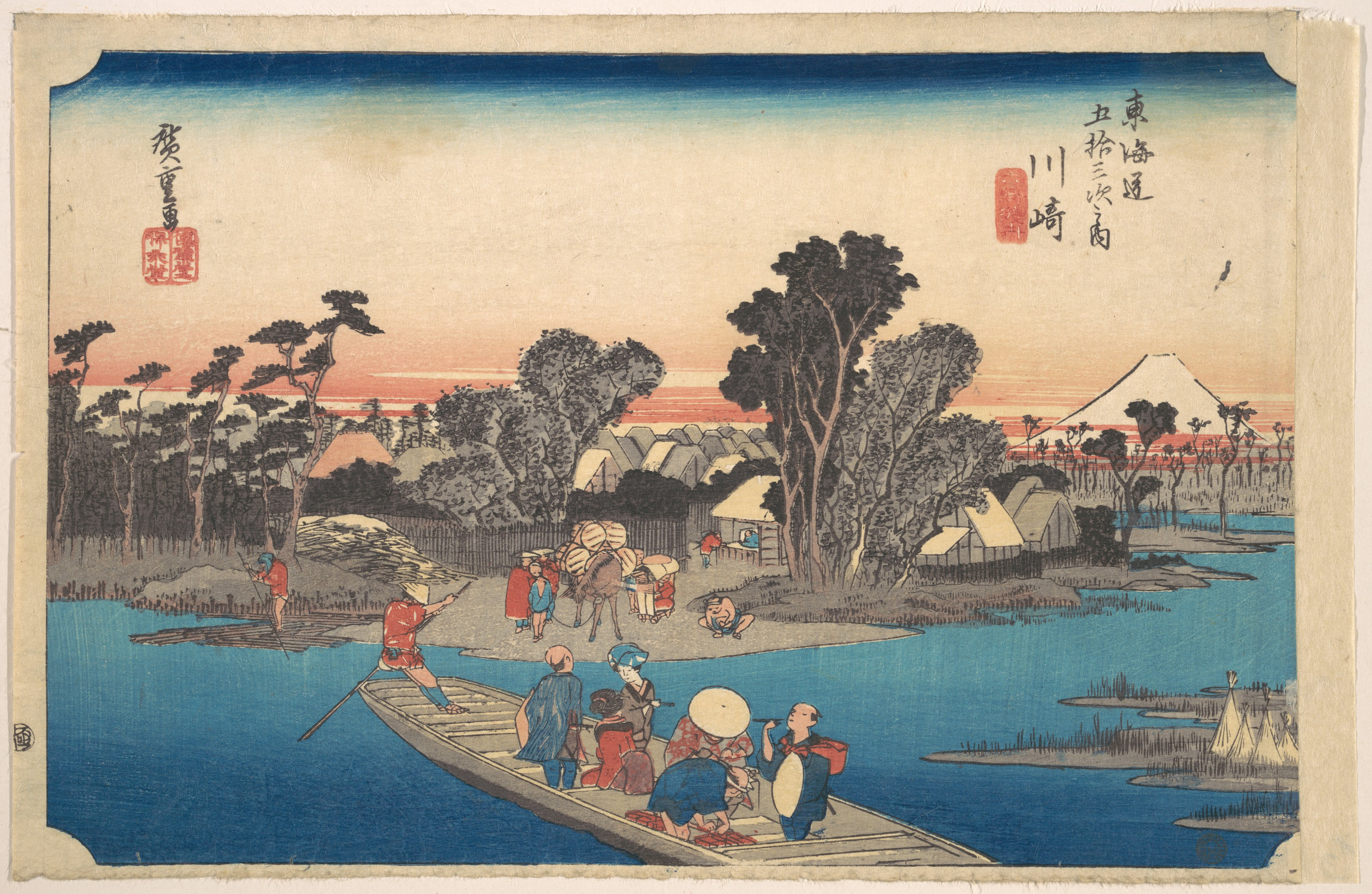 Japan; Print; Prints